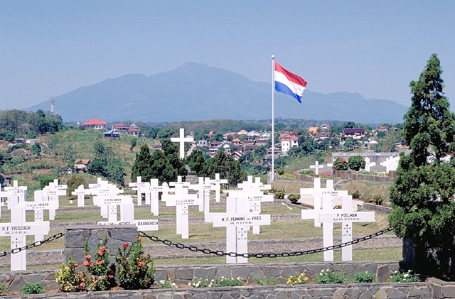 Ereveld Candi